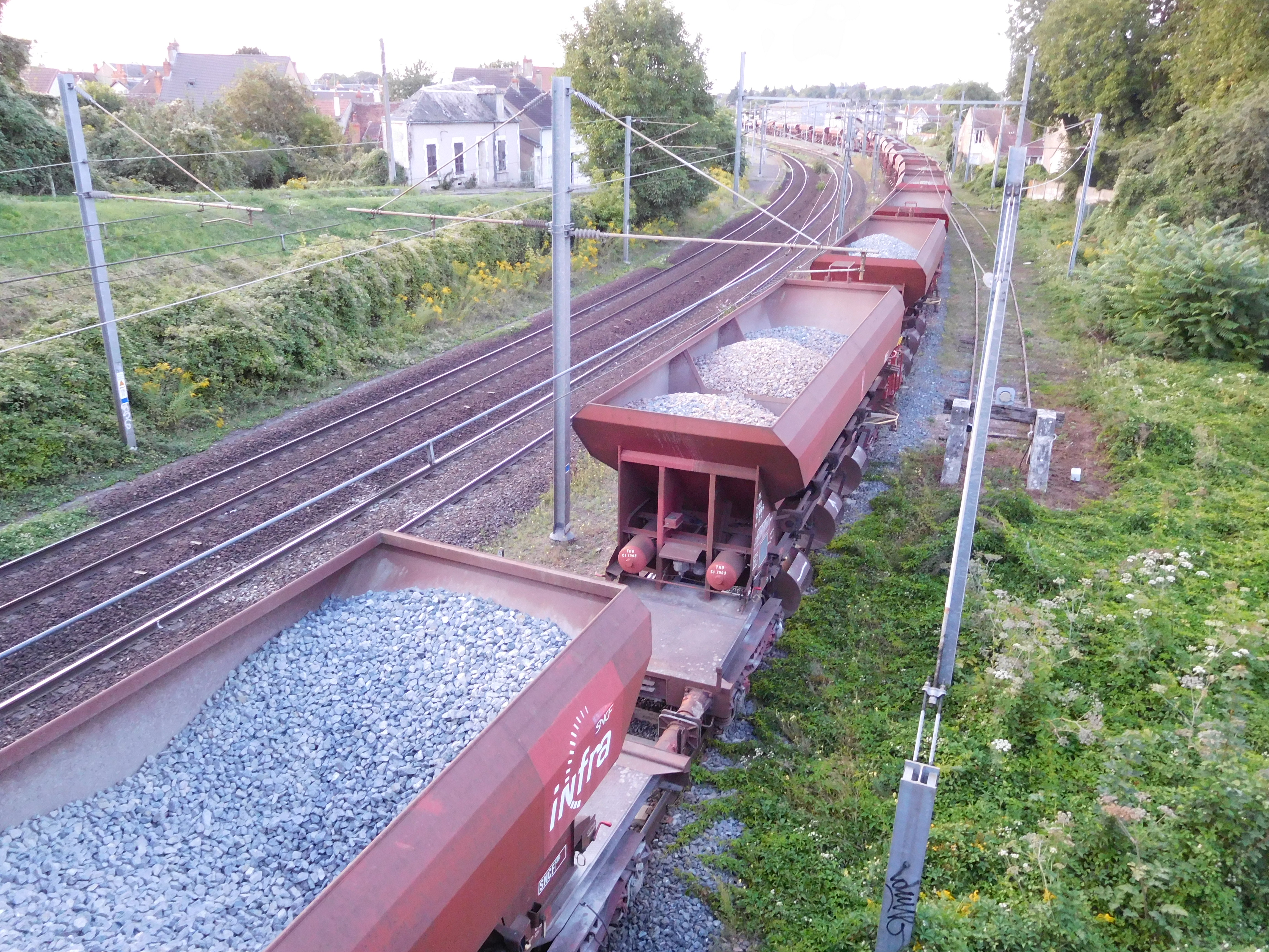 Wagons-trémie (à 3 compartiments) SNCF Infra du train de ballast. Utilisés pour le transport du ballast neuf (sur ce chantier, il vient des carrières nivernaises de Luzy et Epiry) et le déchargement sur la voie. Rame d'environ 25 wagons-trémie, sur le canton principal de la gare de Cosne-sur-Loire (Nièvre, France). À gauche, se trouve la rue du Chemin de Fer (en pente).